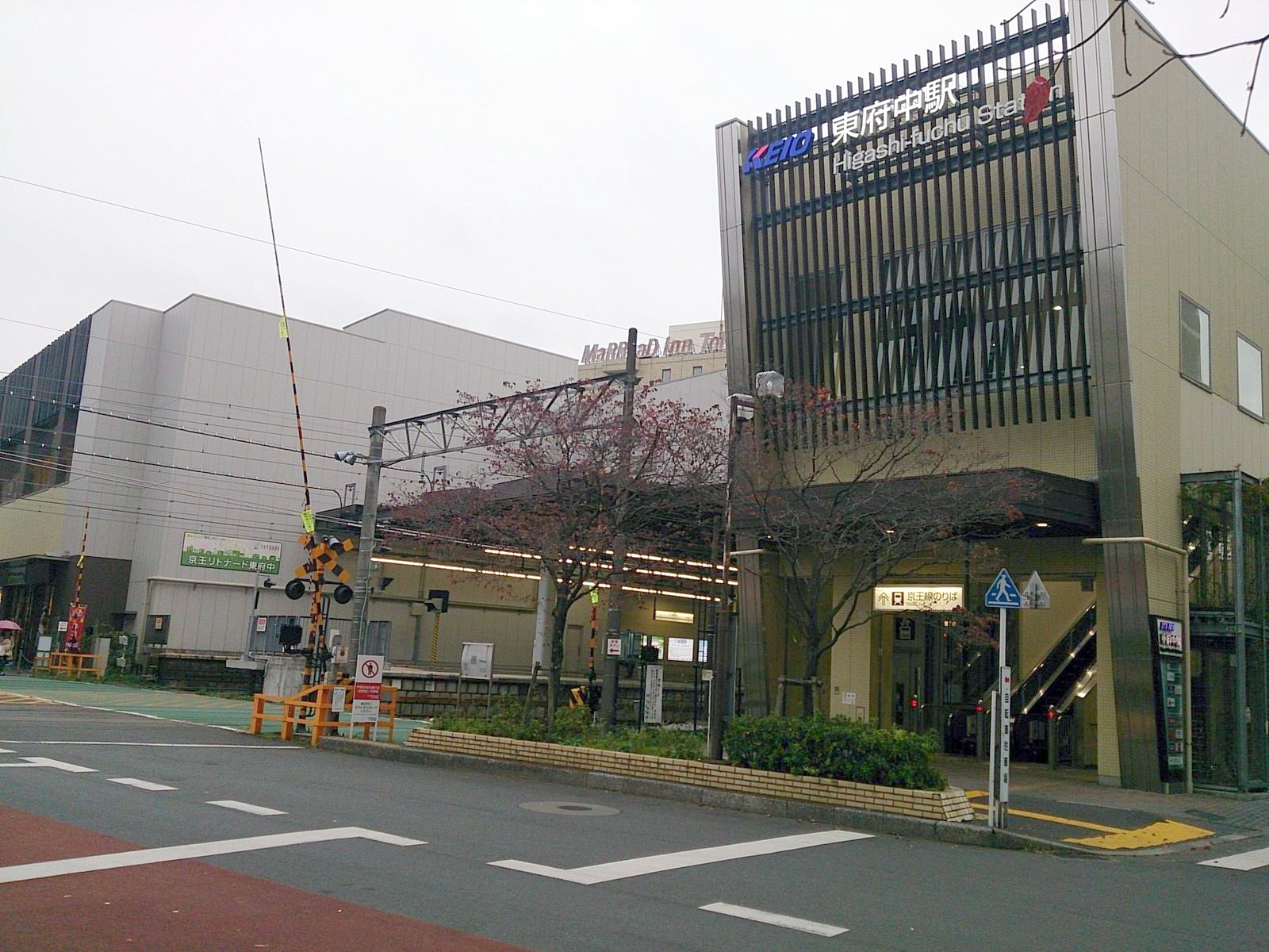 Higashi.fuchu.station.tokyo1 東府中駅